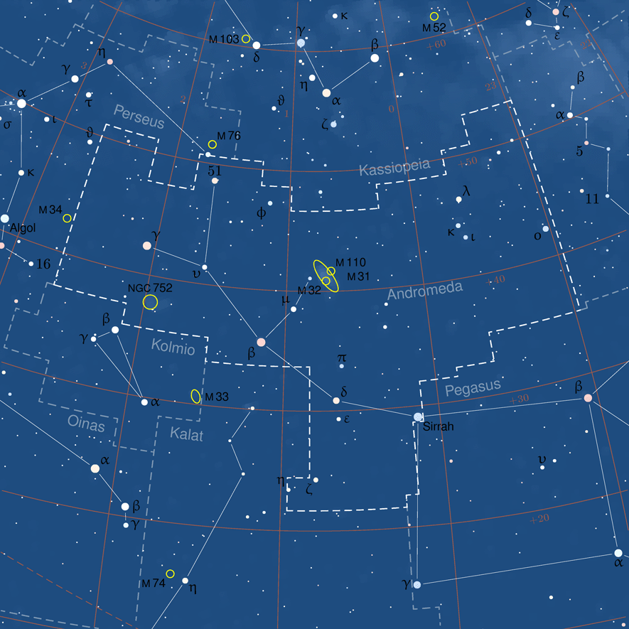 Suomenkielinen tähtikartta Andromedan tähdistöstä. Kuva on tehty PP3-ohjelmalla.